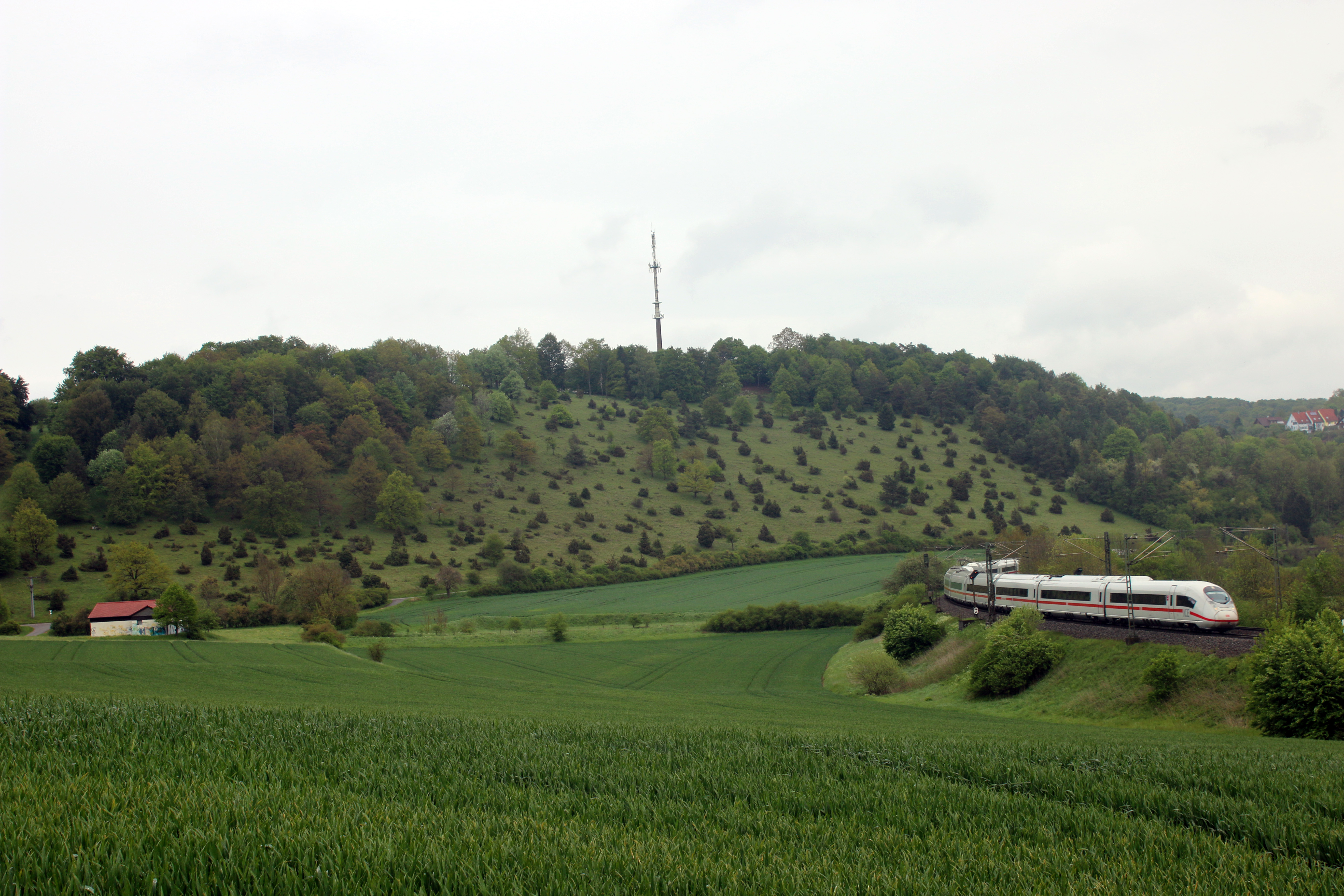 Blick zum Naturschutzgebiet 4.052 „Salenberg“ (Wacholderheide am Hang), Gemeinde Lonsee im Lonetal